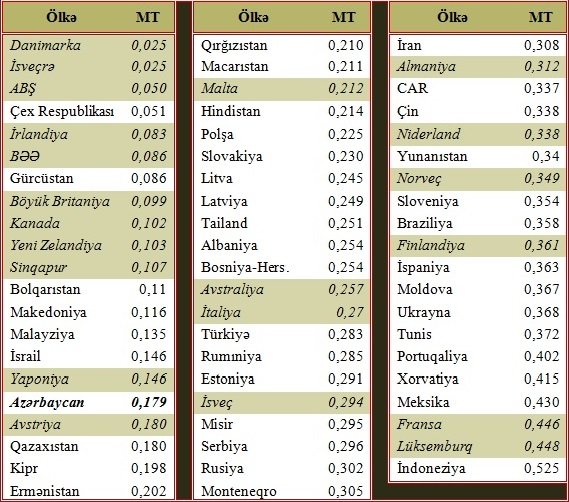 Məşğulluğun tənzimlənməsi sub-indeksi 2015